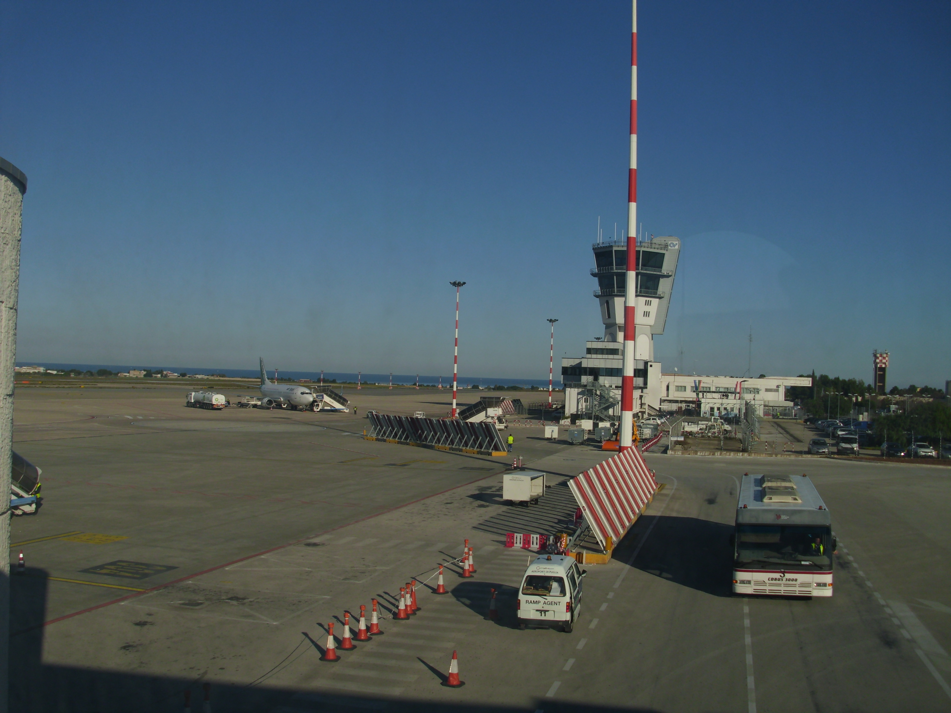 Sicht auf den Flughafen Bari